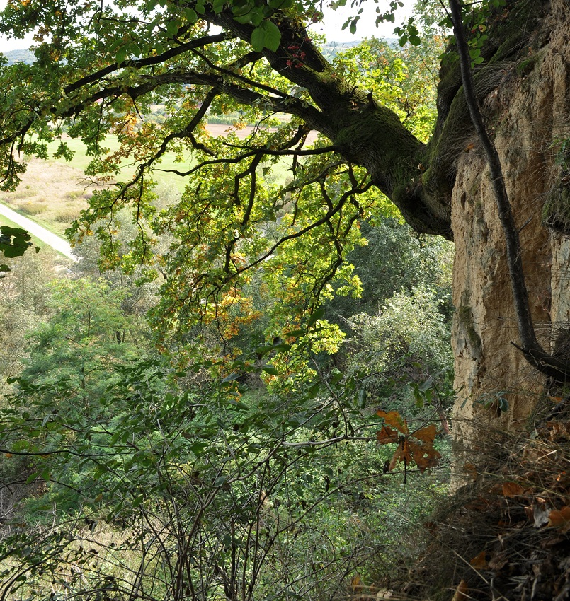 Las Skała w Koszycach Małych przywodzi na myśl Pieniny i Sokolicę. To miejsce zwane jest przez miejscowych Tarnowskie Pieniny.